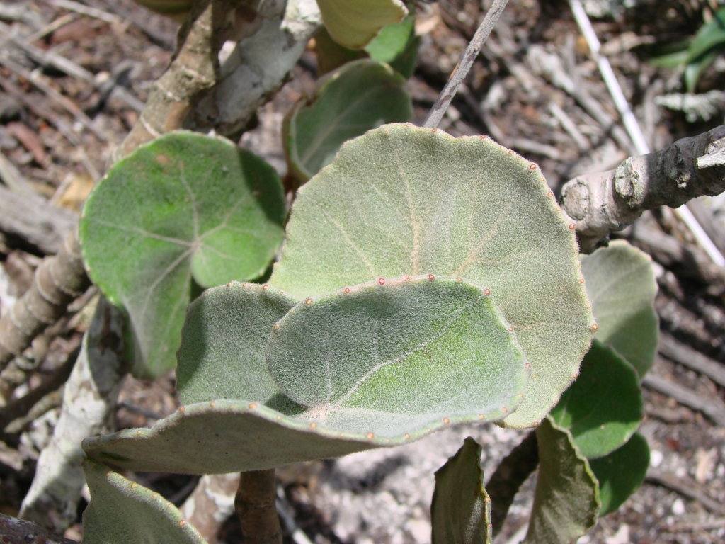 Begonia grisea A. DC. - BEGONIACEAE - Parque Natural Municipal do Morro do Pai Inácio - Chapada Diamantina - Palmeiras - Bahia - Brasil.